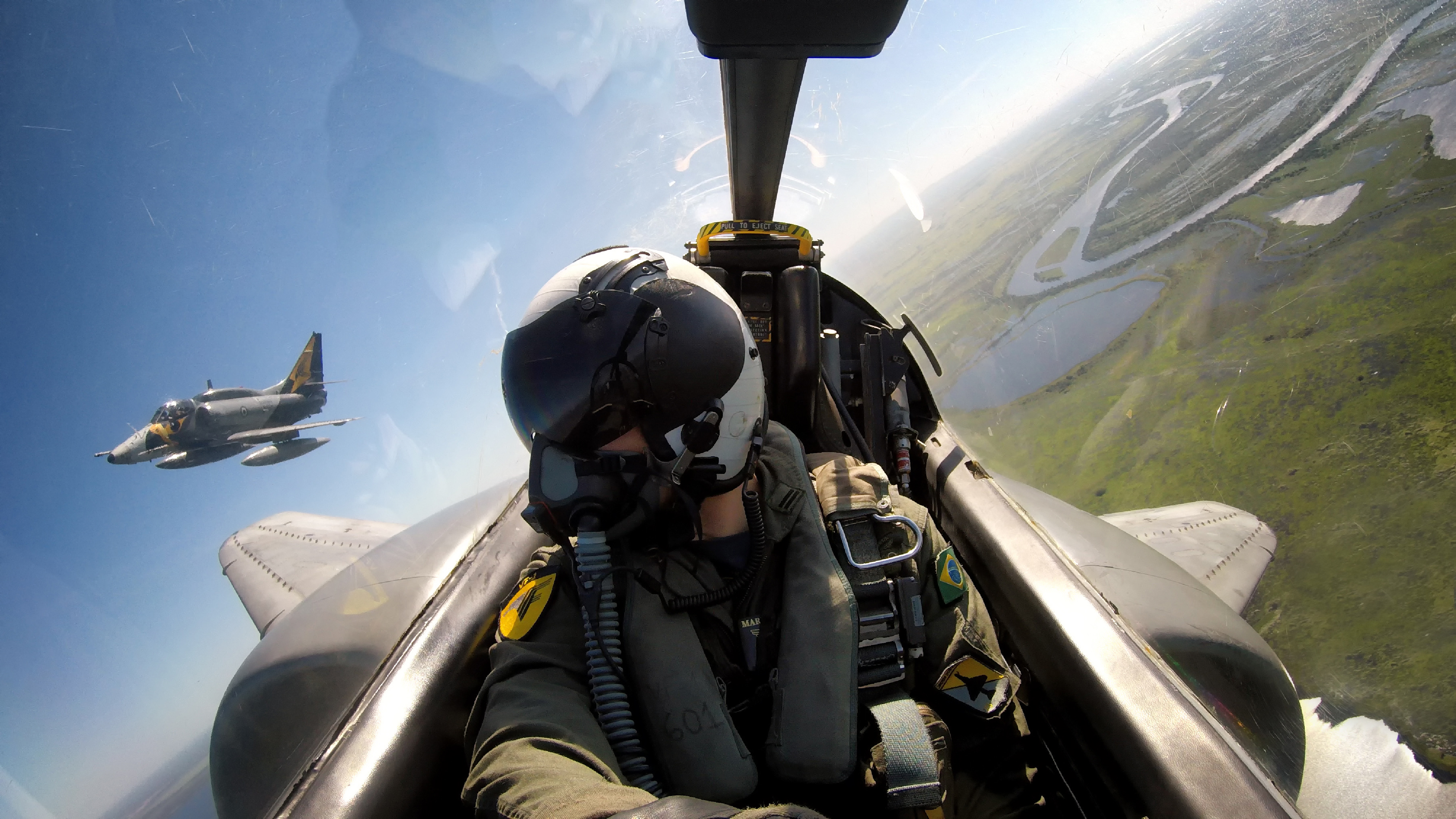 Arquivo liberado pela Marinha do Brasil através de projeto GLAM com Wiki Educação Brasil